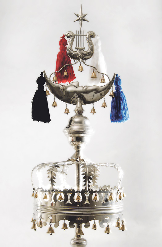 Der traditionelle Schellenbaum der Stadtmusik Klingnau, Argau, Schweiz, wie sie ihn auch heute noch bei Marschmusikauftritten präsentiert.